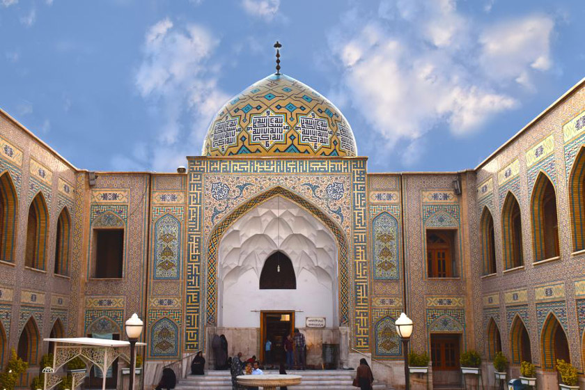 ارامگاه پیر پالاندوز قطب سلسله ذهبیه ساخته شده توسط شیخ حاتم زراوندی جانشین پیر پالاندوز در سلسله ذهبیه